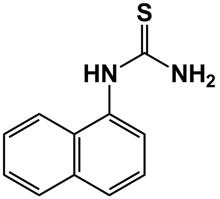 Alfa-naftyltiourea, rodenticíd.